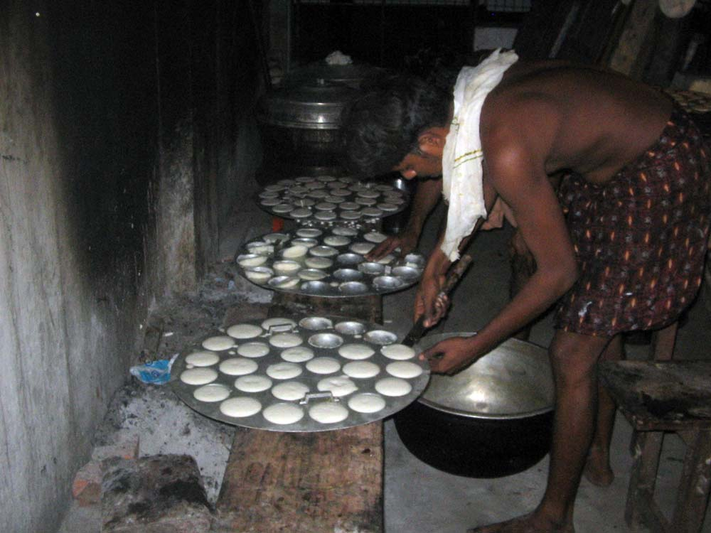 ഇഡ്ഡലിപാചകം